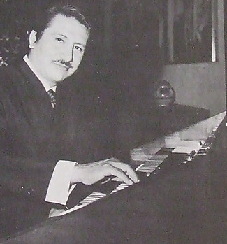 Juan Torres